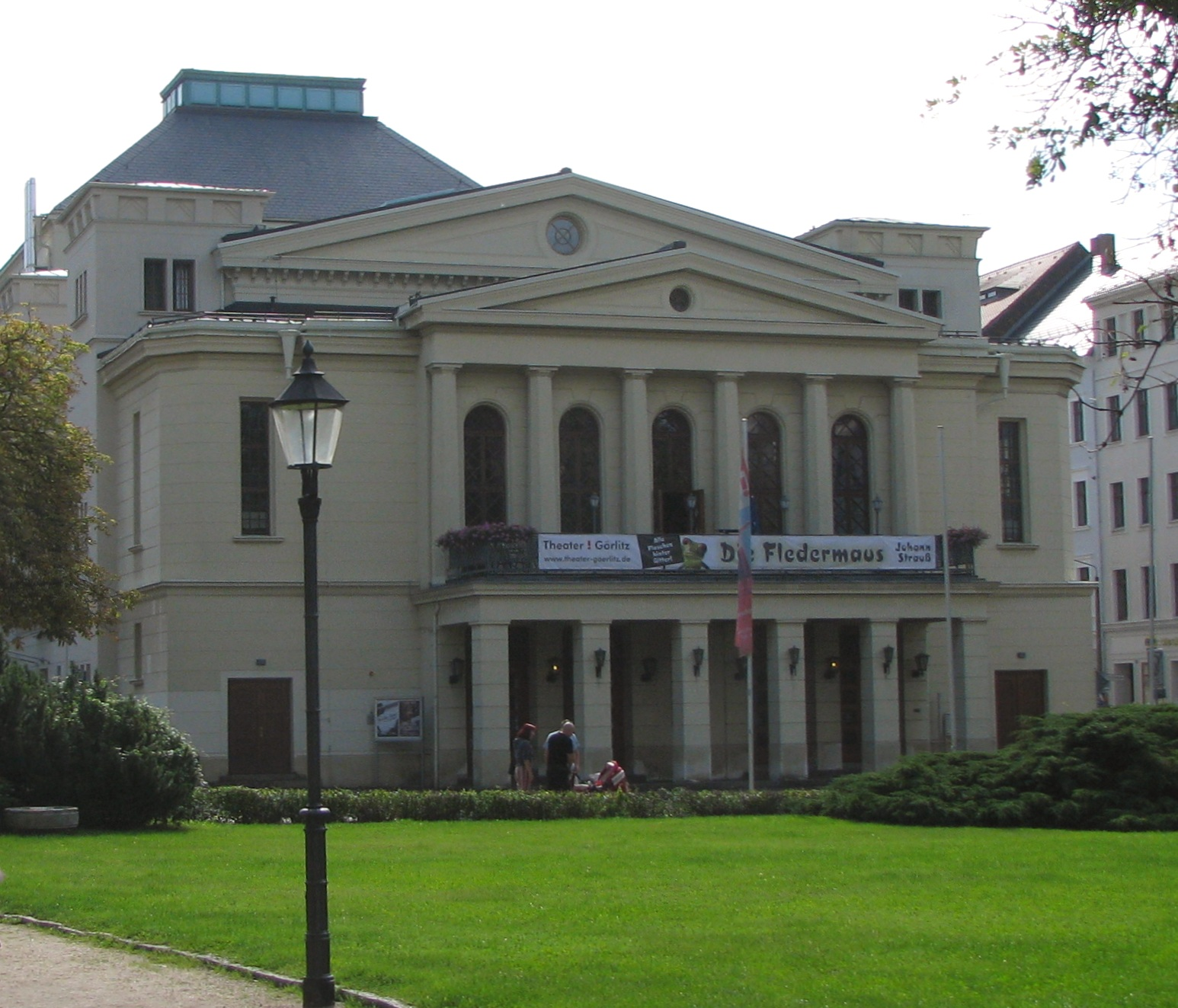 Görlitz Theater am Demianiplatz Foto 2008 Wolfgang Pehlemann Wiesbaden IMG_0222